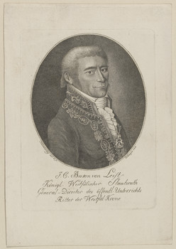 Heinrich Schwenterley: Porträt Justus Christoph Leist, Göttingen 1811